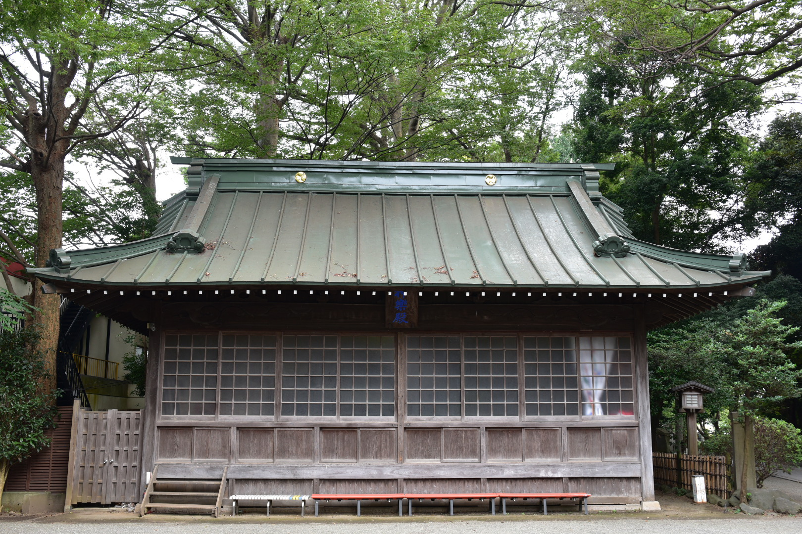 前鳥神社の神楽殿（神奈川県平塚市）